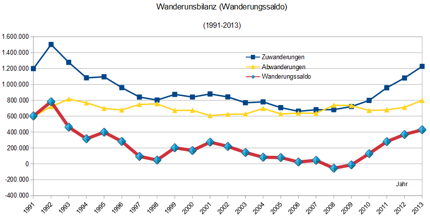 Wanderungsbilanz